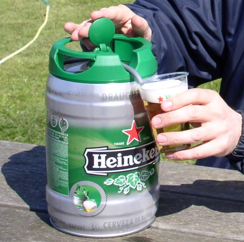 Heineken tapvat 5 liter